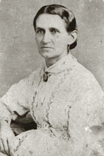 Leonor Isabel Esteva Parra de Luzardo, hermana de Joaquín Esteva Parra, médico Venezolano. Sus descendientes representan la descendencia de Joaquín Esteva Parra en Venezuela.